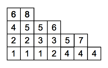 Tableau de Young semi-standard de forme 7642